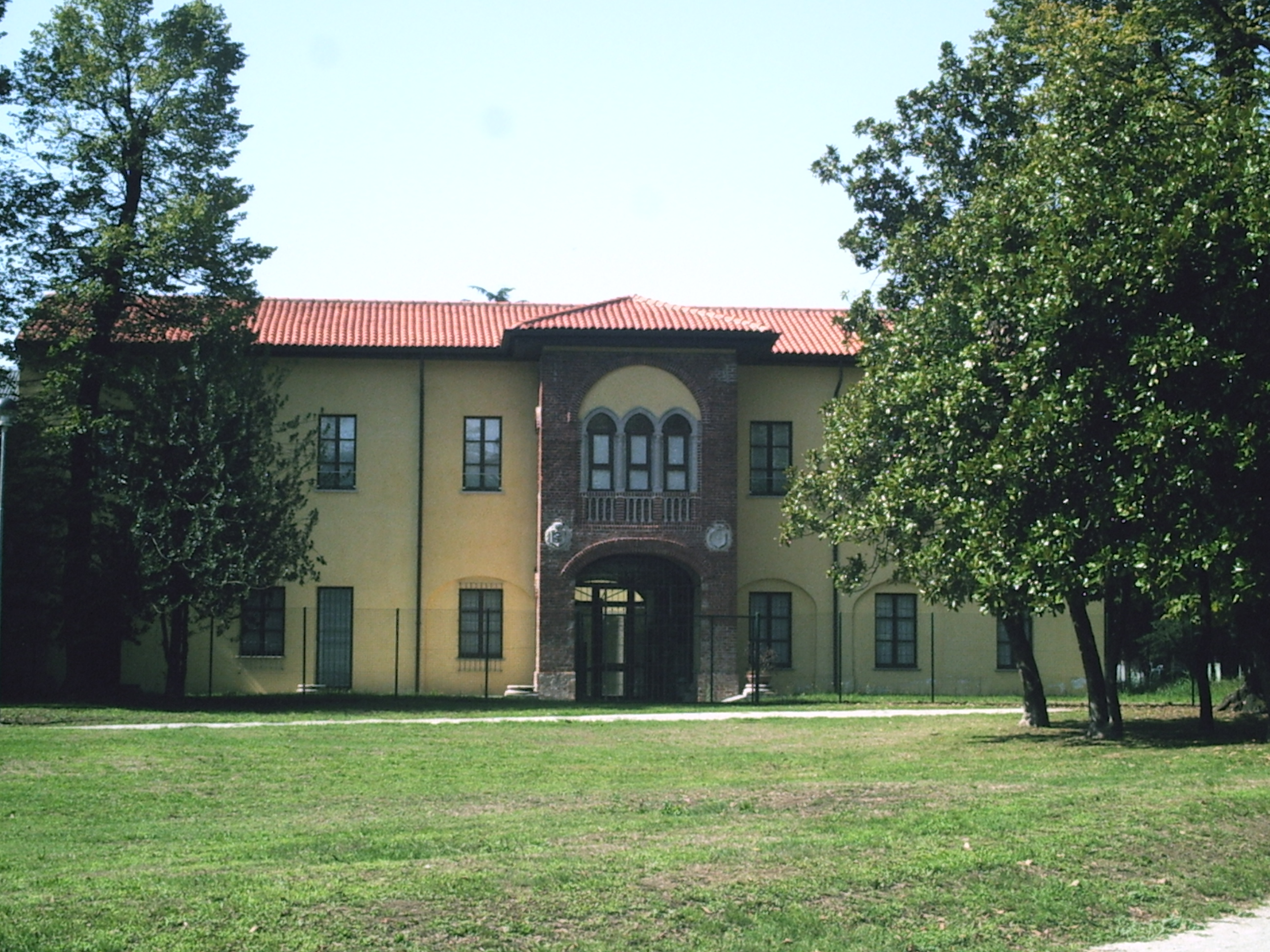 Villa Corvini dal parco retrostante